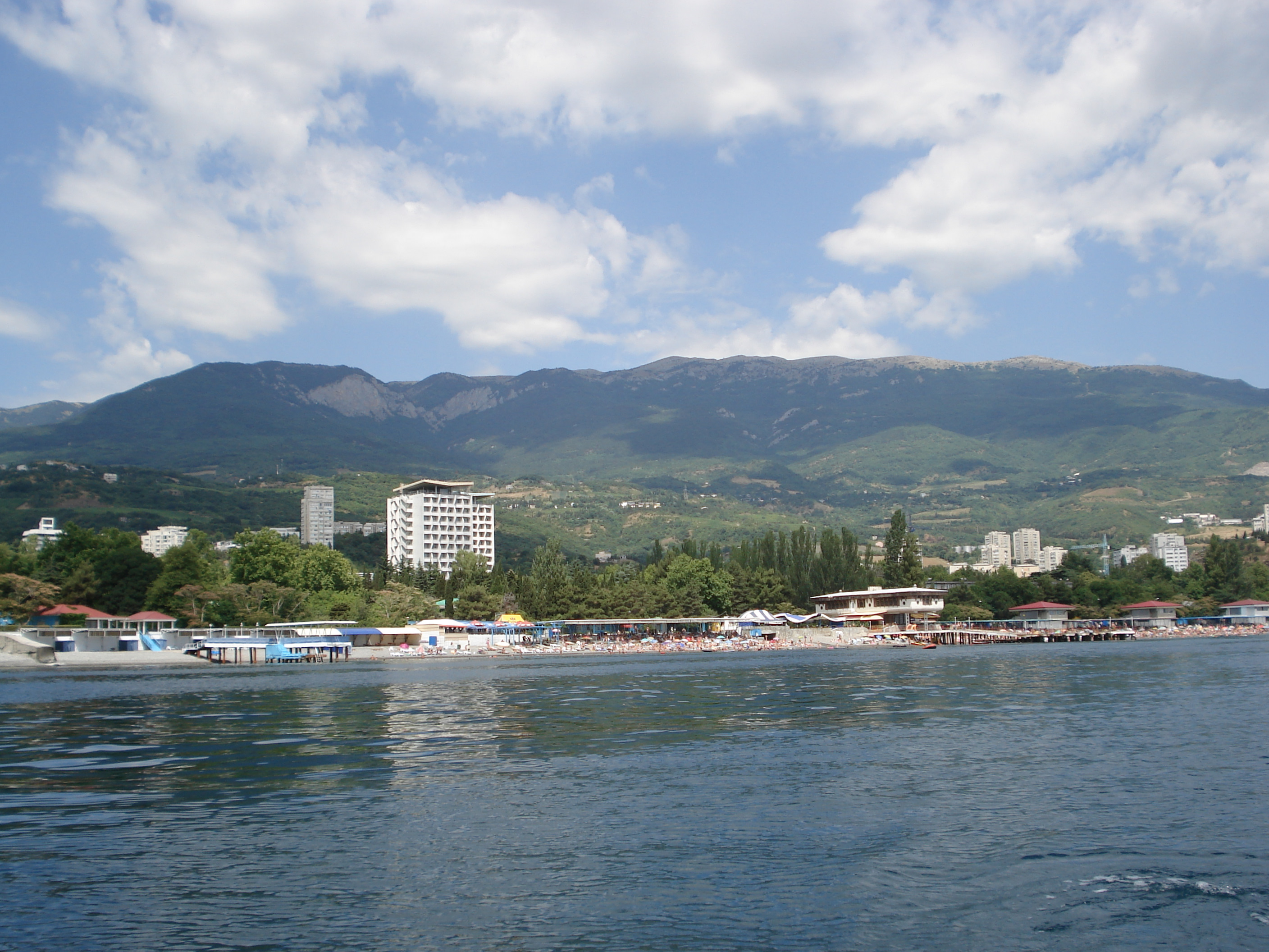 Вид на курортную зону Партенита и Аю-Даг с лодки